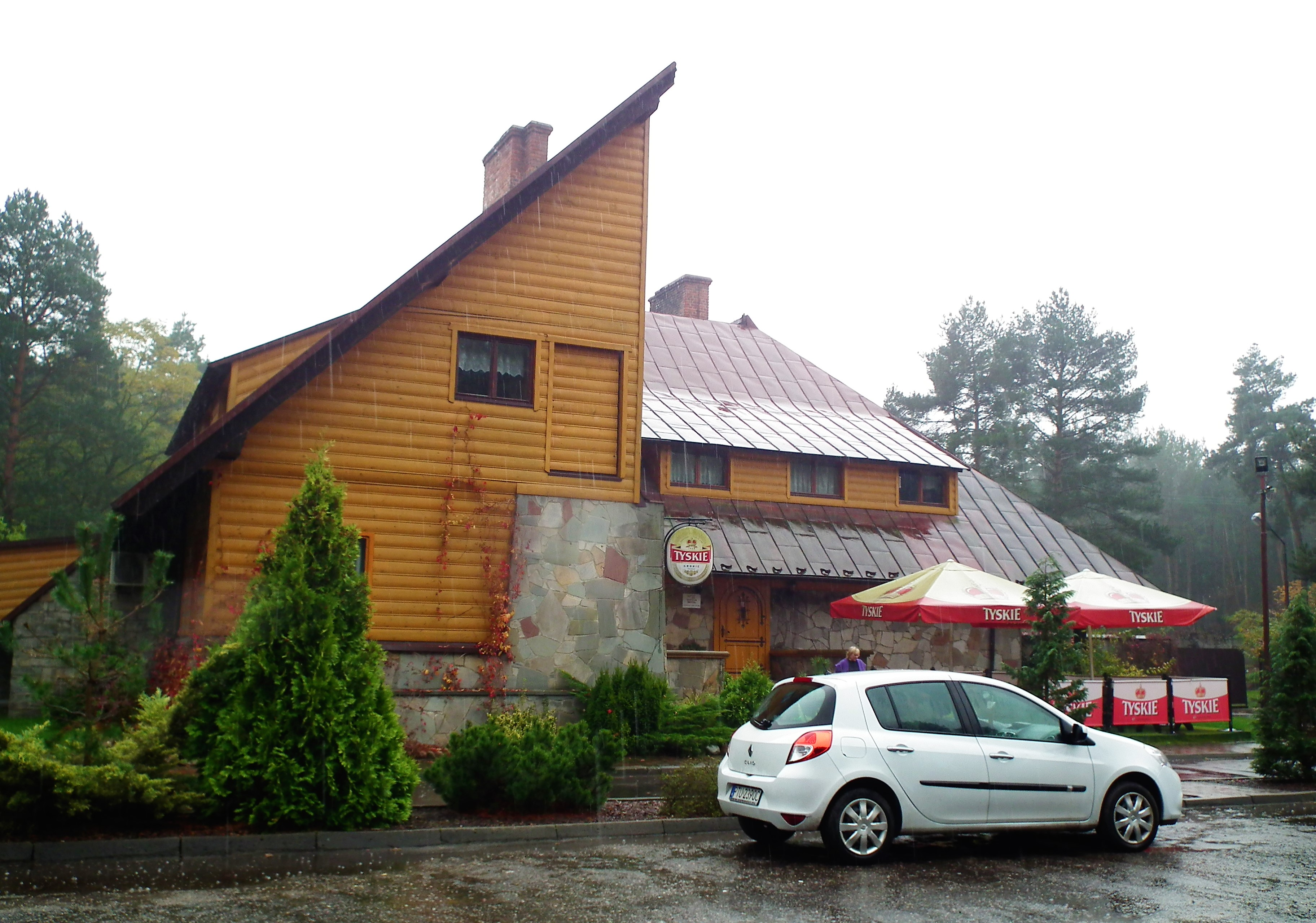 Rzymsko BG - zajazd Zapiecek.